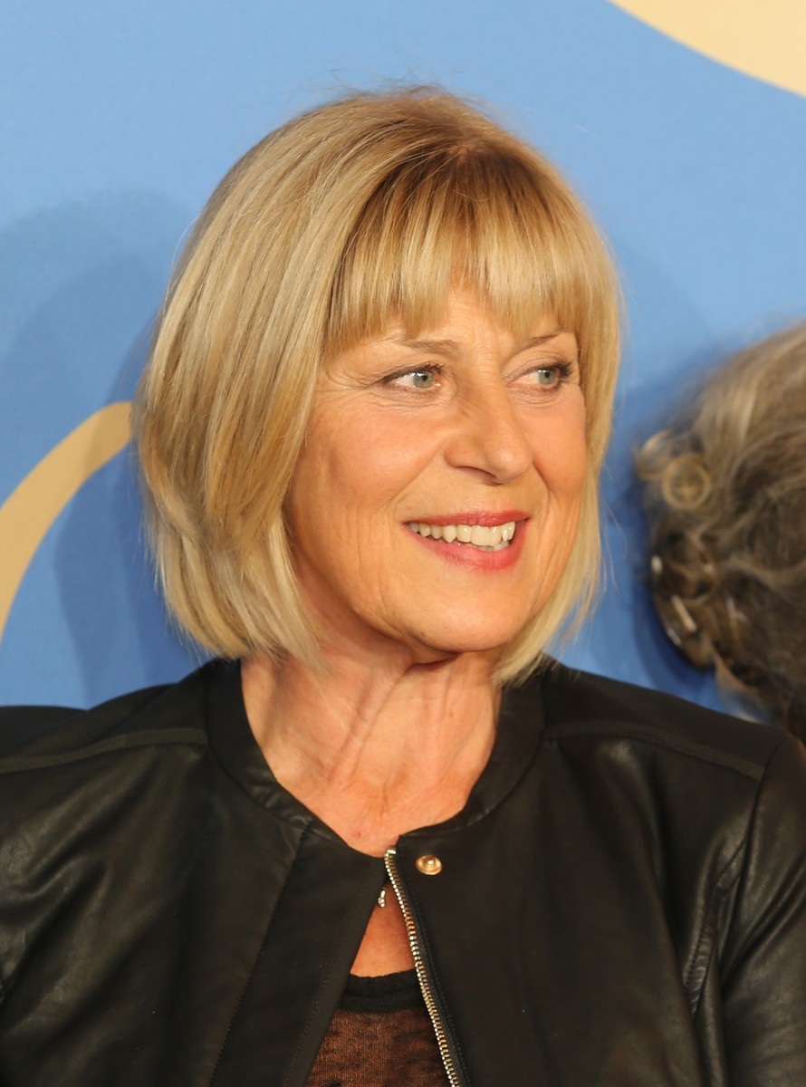 Mona Seefried, österreichische Schauspielerin. Hier beim exklusiven Fanevent "Serienmarathon" (Sturm der Liebe, ARD) am 15. September 2015 im Mathäser Filmpalast in München auf dem roten Teppich.